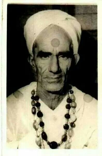 खेताराम जी महाराज